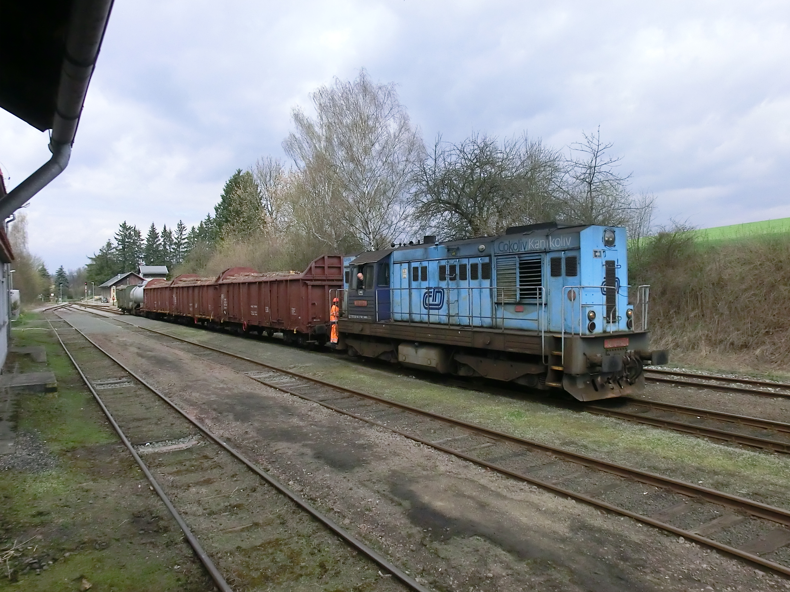 Manipulační vlak z Jablonce nad Jizerou do Martinic, zachycený na nádraží v Jilemnici. Soupravu vede lokotraktor 742.148 (vyroben v ČKD Praha v roce 1979), v Jilemnici se k ní připojoval další vagon s dřevem a čekalo se na předjetí osobním vlakem MOs 15507 v podobě motoráčku 810.652.